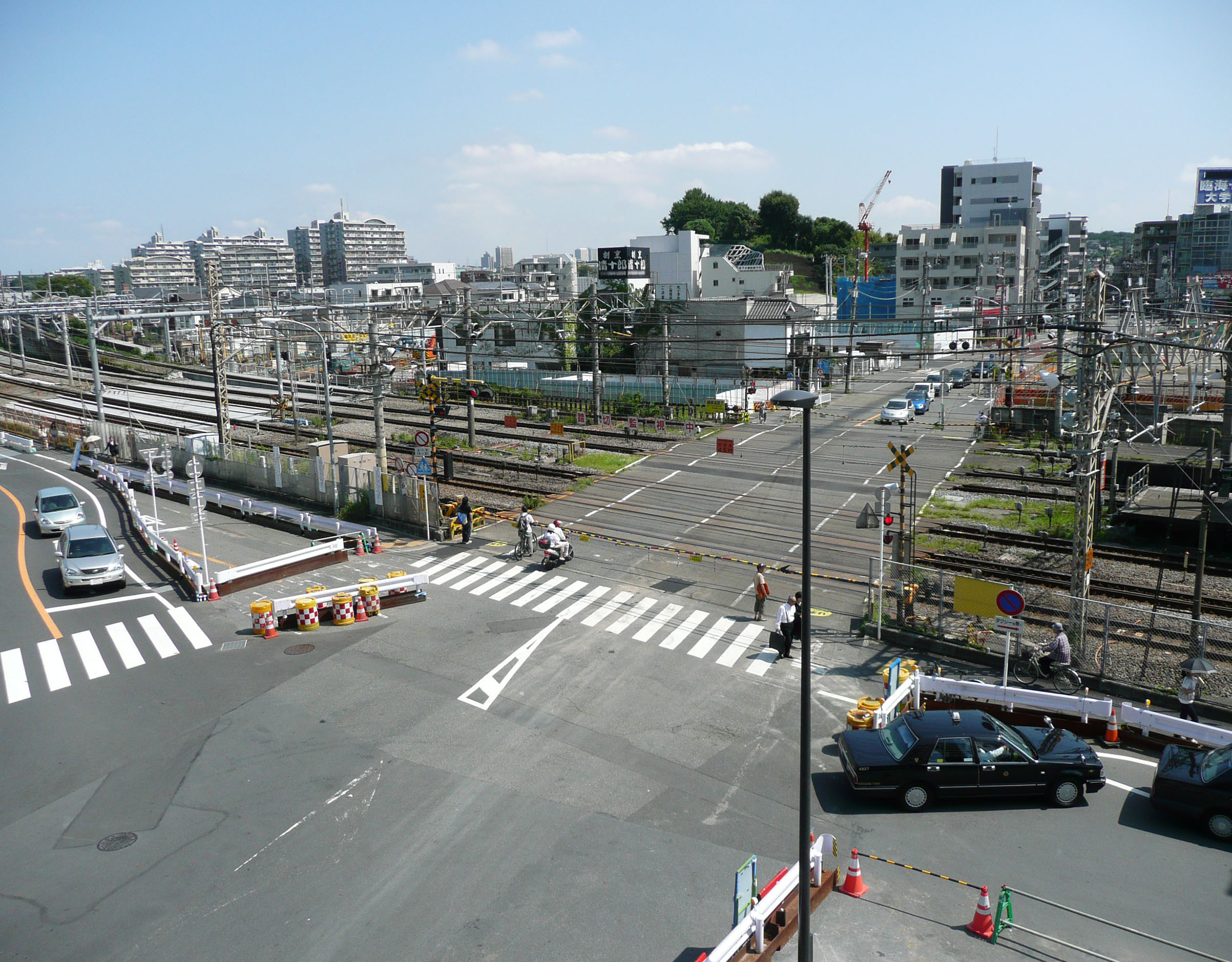 戸塚大踏切（戸塚駅に隣接）